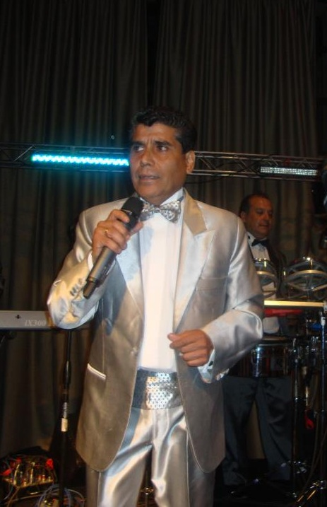 Manuel Palacios Riquelme en 2011